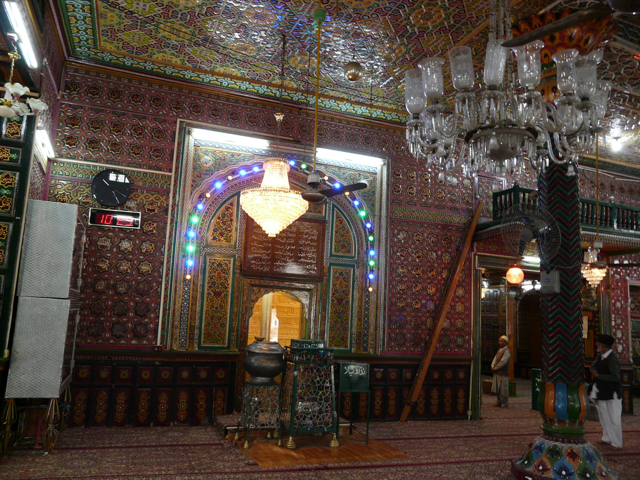 Dastgir Sahib interior Dastgeer Sahib, Srinagar, Jammu and Kashmir, India